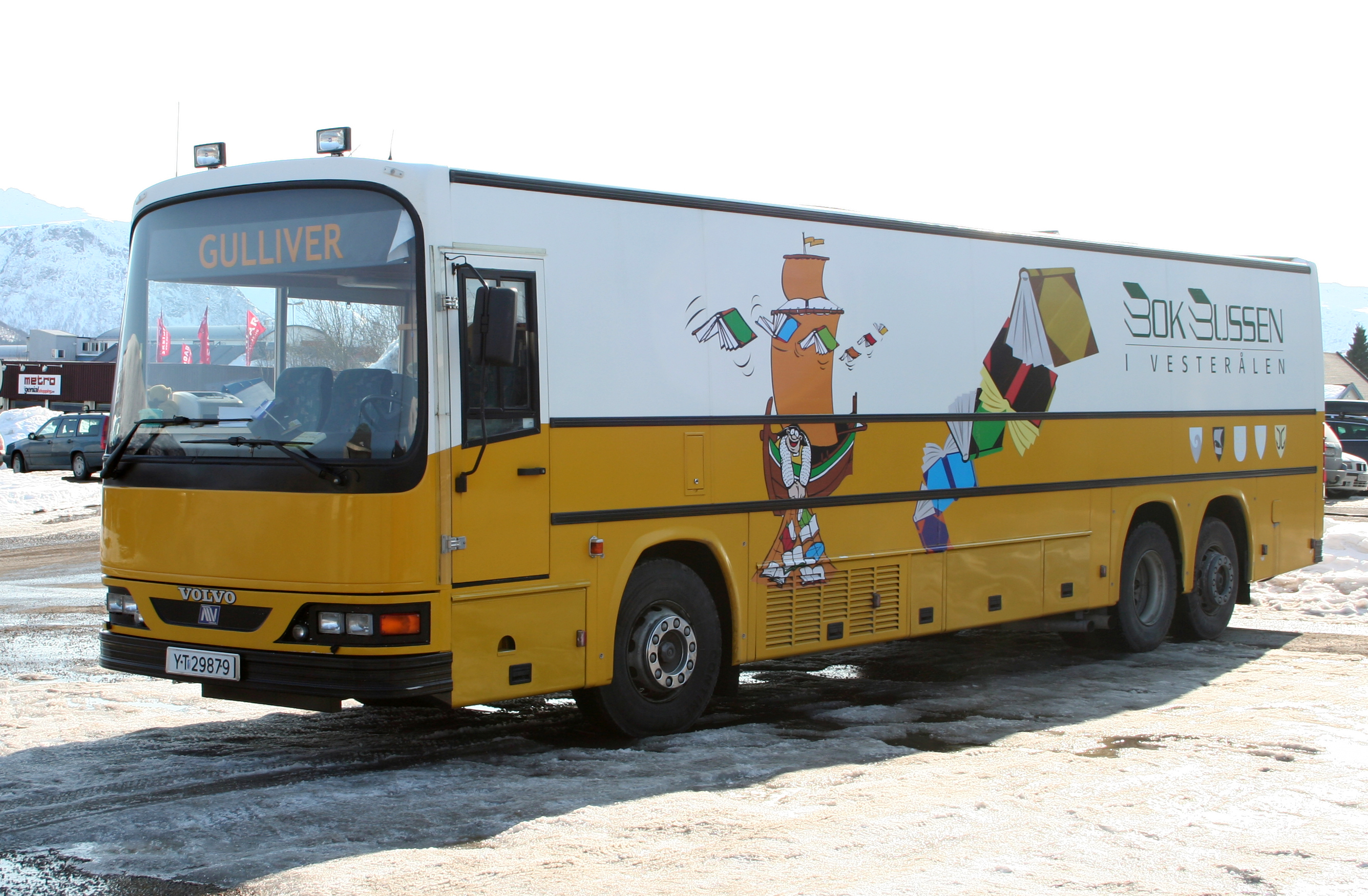 Bokbussen i Vesterålen (Vesterålen Bookmobile) photographed in Sortland